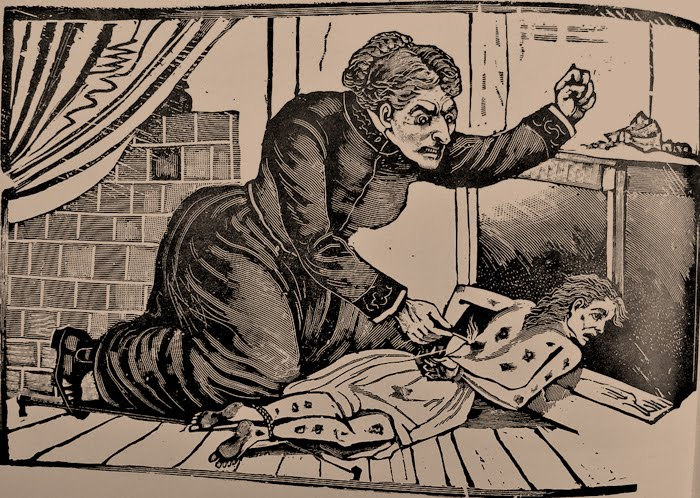 Guadalupe Martinez de Bejarano, la primera asesina serial (mujer) en México. Guadalupe Martinez de Bejarano, the first female serial killer in Mexico.